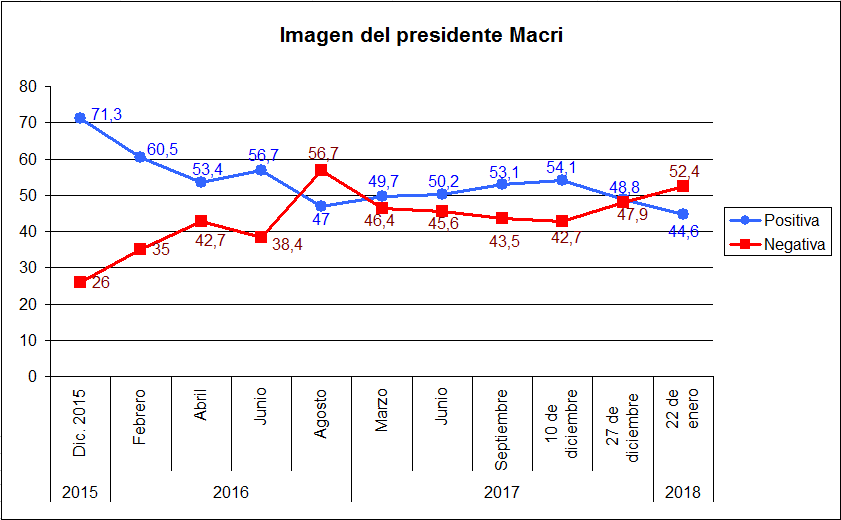 Argentina. Imagen del presidente Mauricio Macri entre la fecha de su asunción (diciembre 2015 y el 22 de enero de 2018). En base a datos de Ricardo Rouvier & Asociados [1][2]